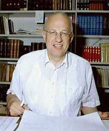 Schriftelijke toestemming voor publicatie op Wikipedia gekregen van de maker van de foto, dhr. H.J. Oudenampsen